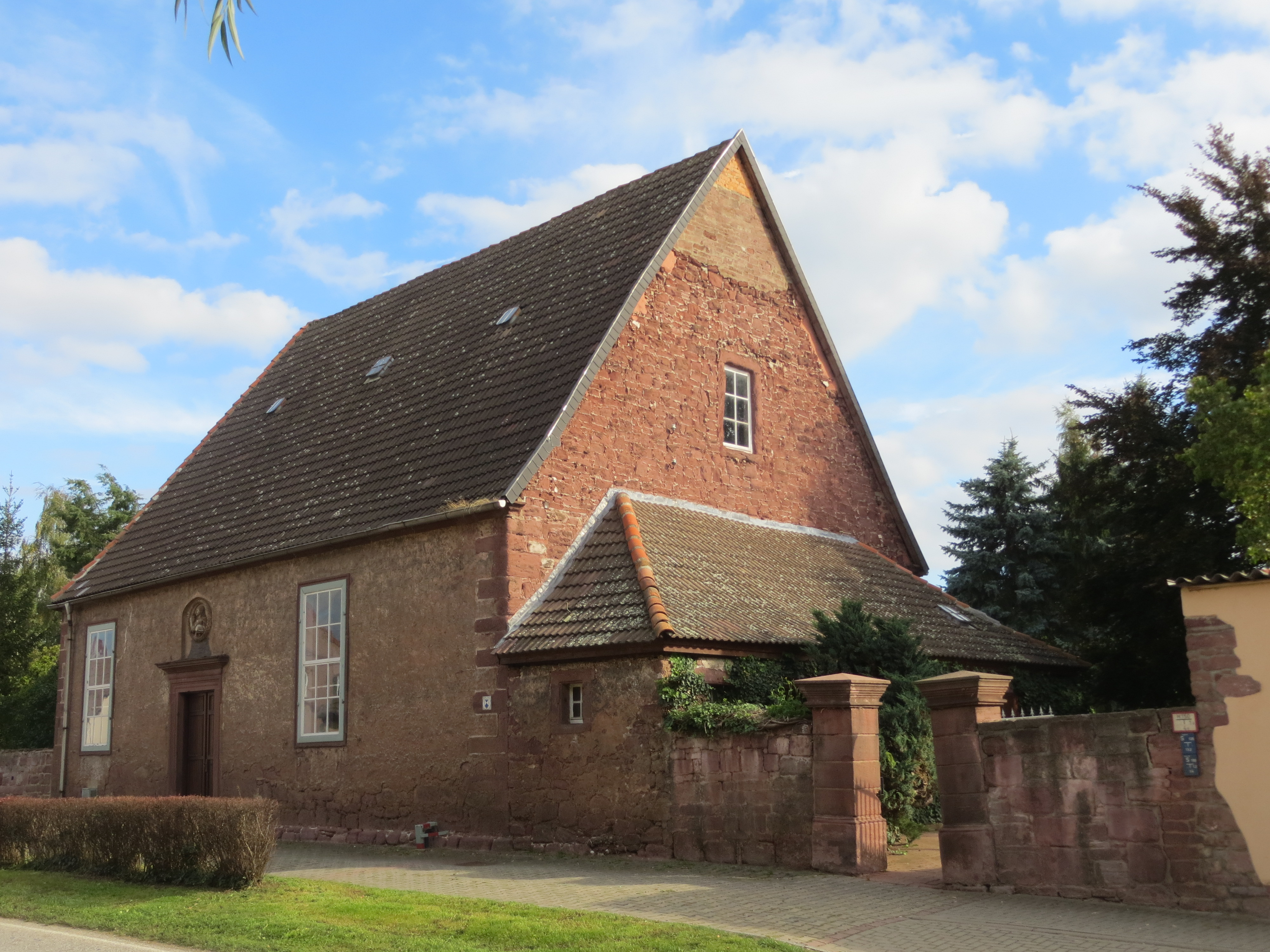 Kelbra (Kyffhäuser) – Jesus-KircheThis is a photograph of an architectural monument. 84694